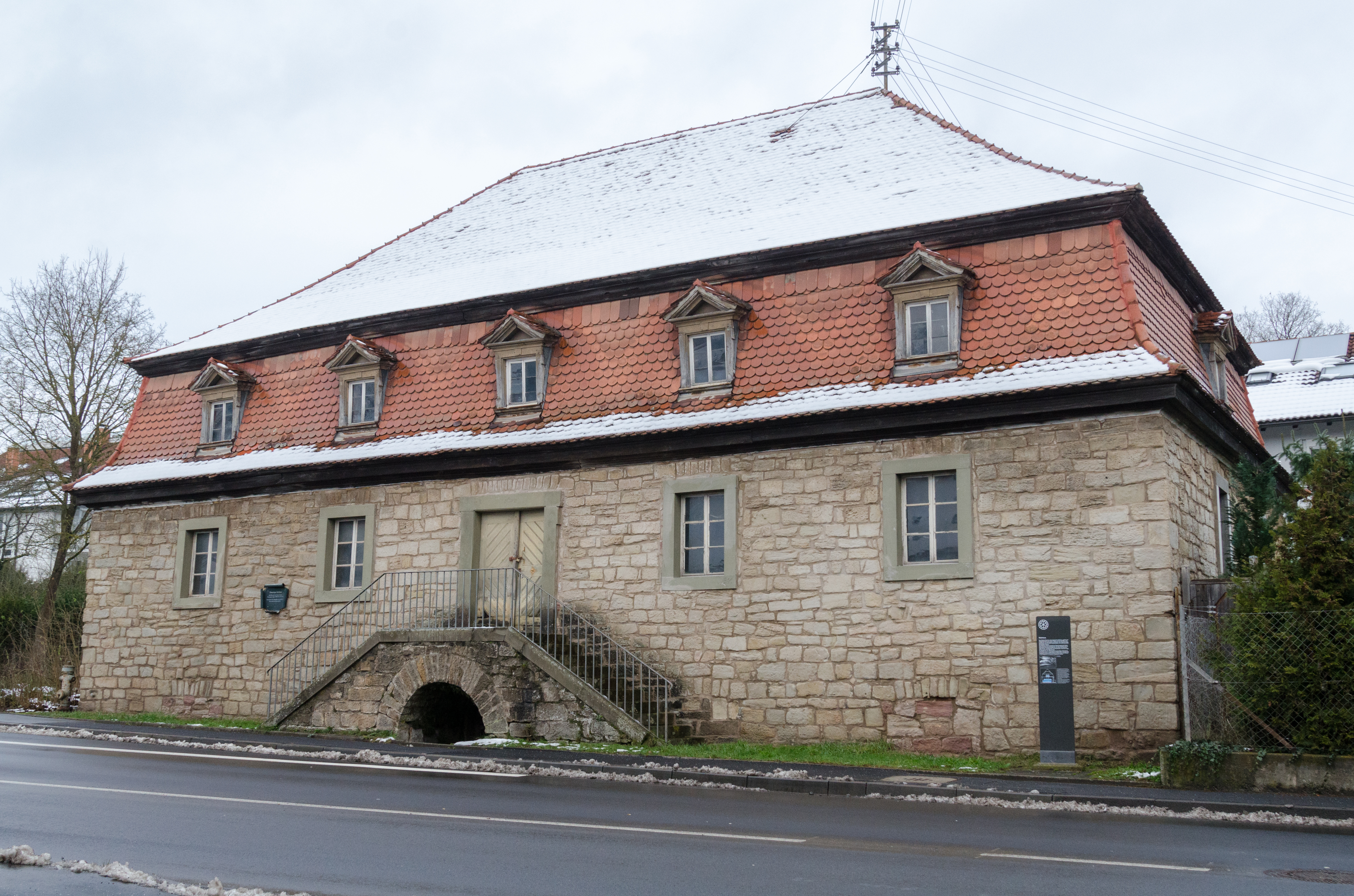 Bad Kissingen, Hausen, Untere Saline 11, Salzhaus